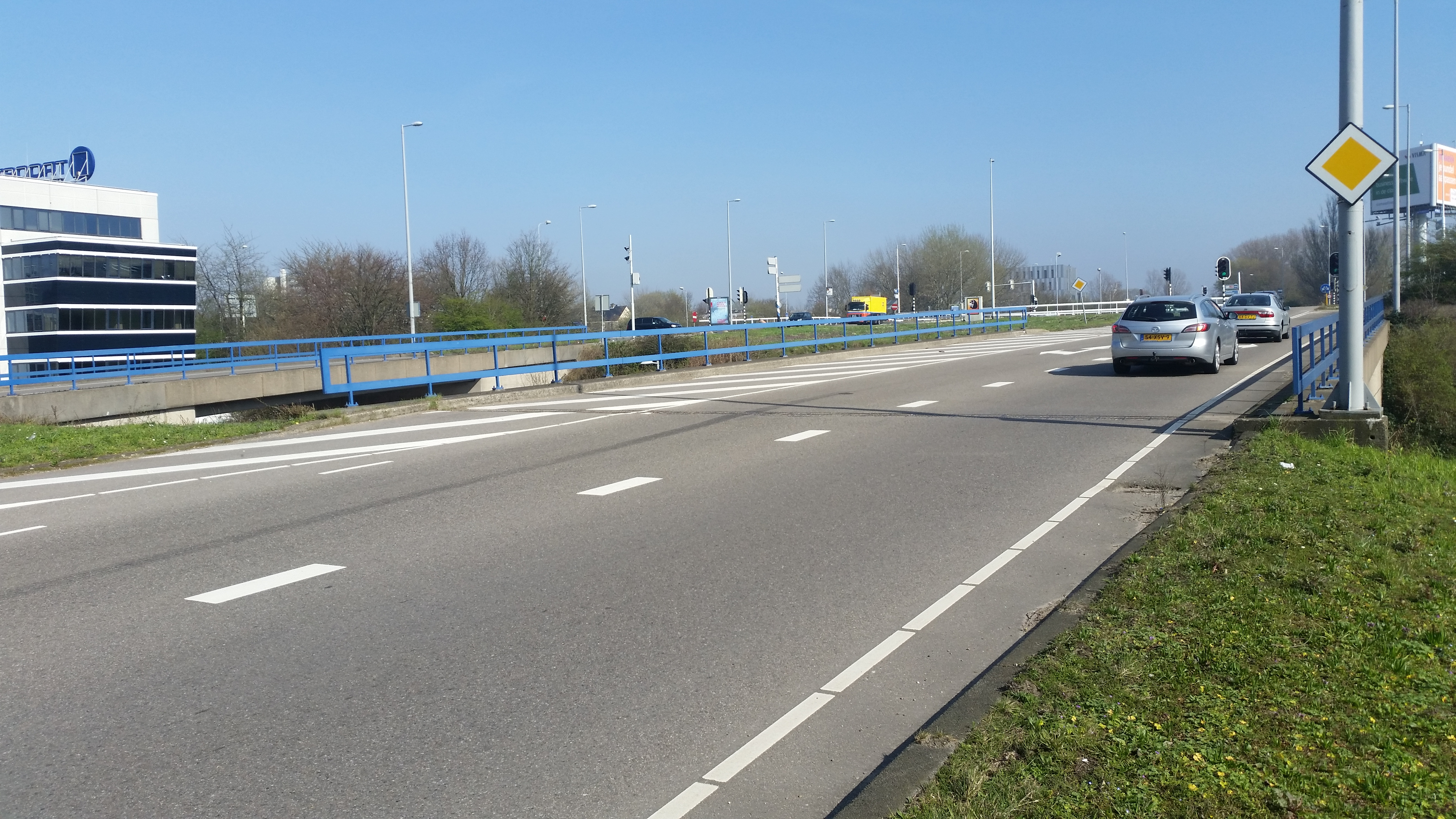 Brug 655 (links) naast brug 665 (rechts)